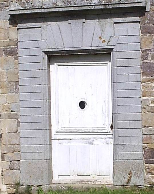 Encadrement d'une porte de l'abbaye de La Lucerne en granite bleu de Carolles, Manche. Murs en granite de Vire. Author : Sebb Date : 07/2006